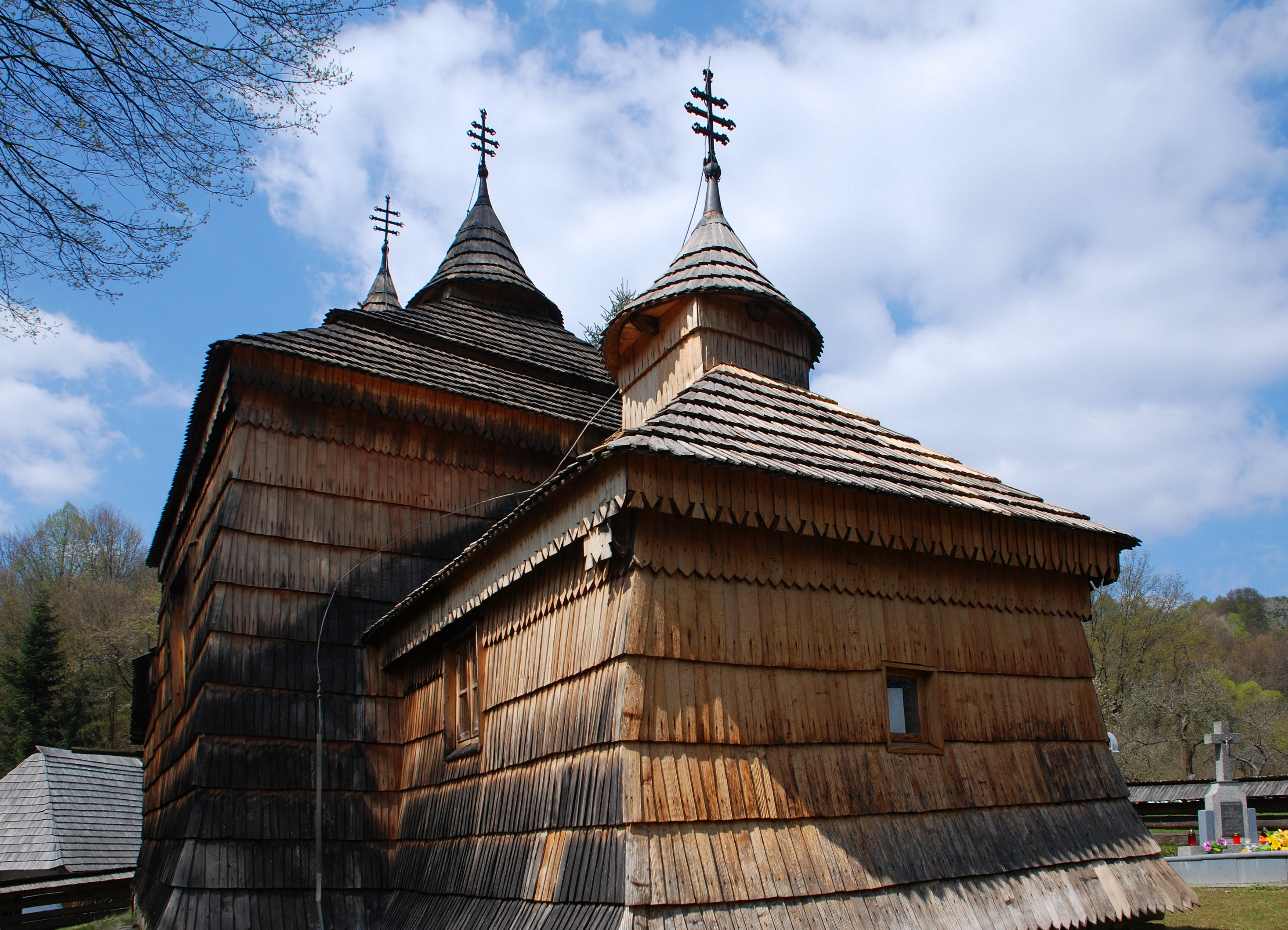 wieś Krajné Čierno